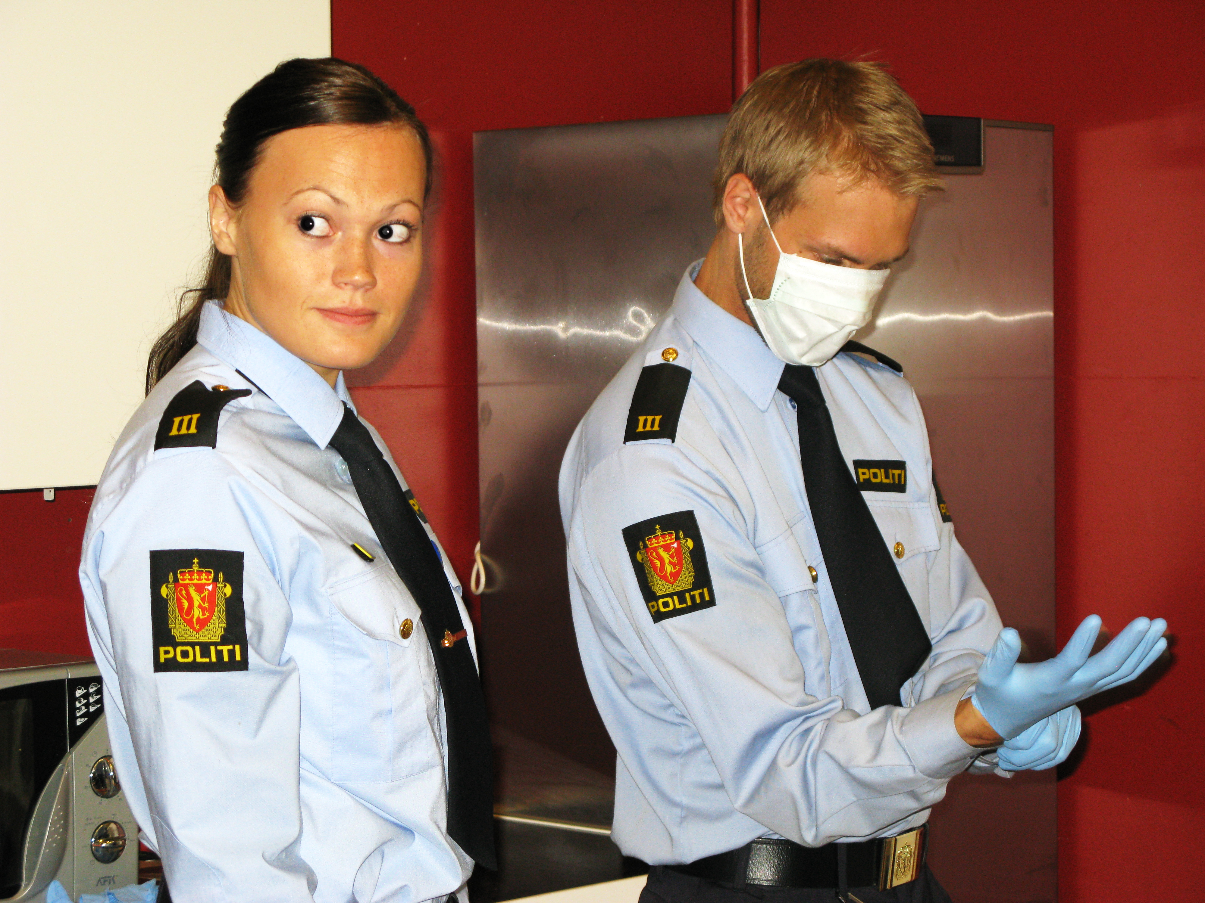 Justisminister Knut Storberget får en oppdatering om status på DNA-prosjektet åtte måneder etter at DNA-reformen ble innført.